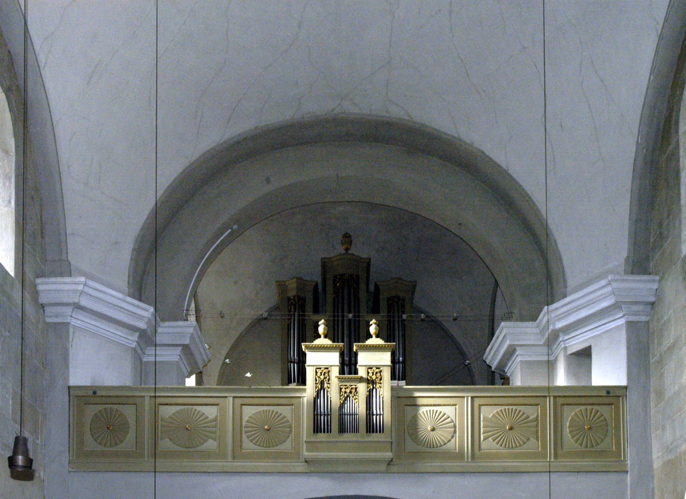 Katholische Pfarrkirche Maria Geburt in Schöngrabern, Gemeinde Grabern - Die Empore mit der Orgel von Johann Georg Fischer aus dem Jahre 1816